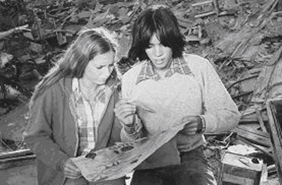 גבי ודבי (Gabby & Debby) הייתה תוכנית ללימוד אנגלית שהופקה על ידי הטלוויזיה החינוכית בשנת 1976. בשנות השמונים עלתה בטלוויזיה החינוכית גרסה מחודשת בצבע של גבי ודבי